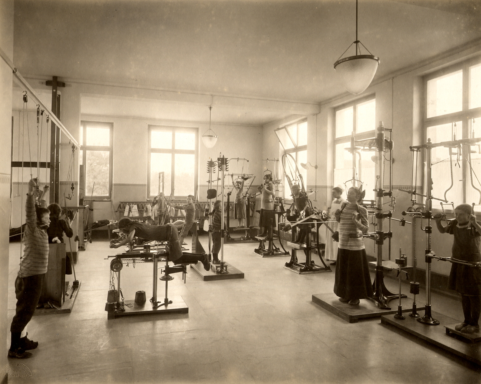 Gymnastiksaal mit Apparaten der maschinellen Orthopädie in der Anstalt Balgrist (heute Unispital Balgrist, Zürich, Schweiz)